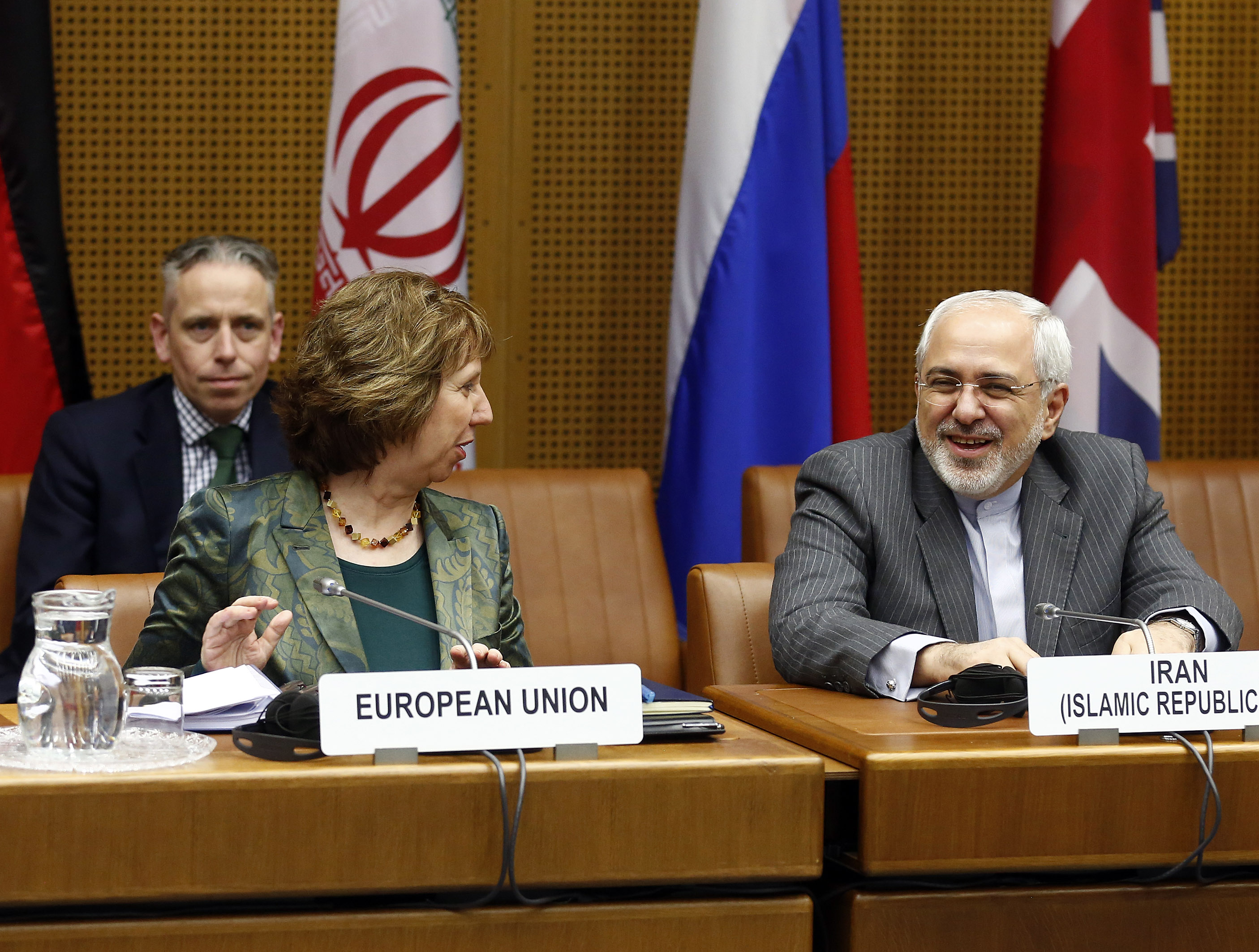 Irankonferenz. Außenminister Mohammed Dschawad Sarif trifft die Hohe Vertreterin der EU für Außen- und Sicherheitspolitik, Catherine Ashton in Wien. 18.02.2014, Foto: Dragan Tatic